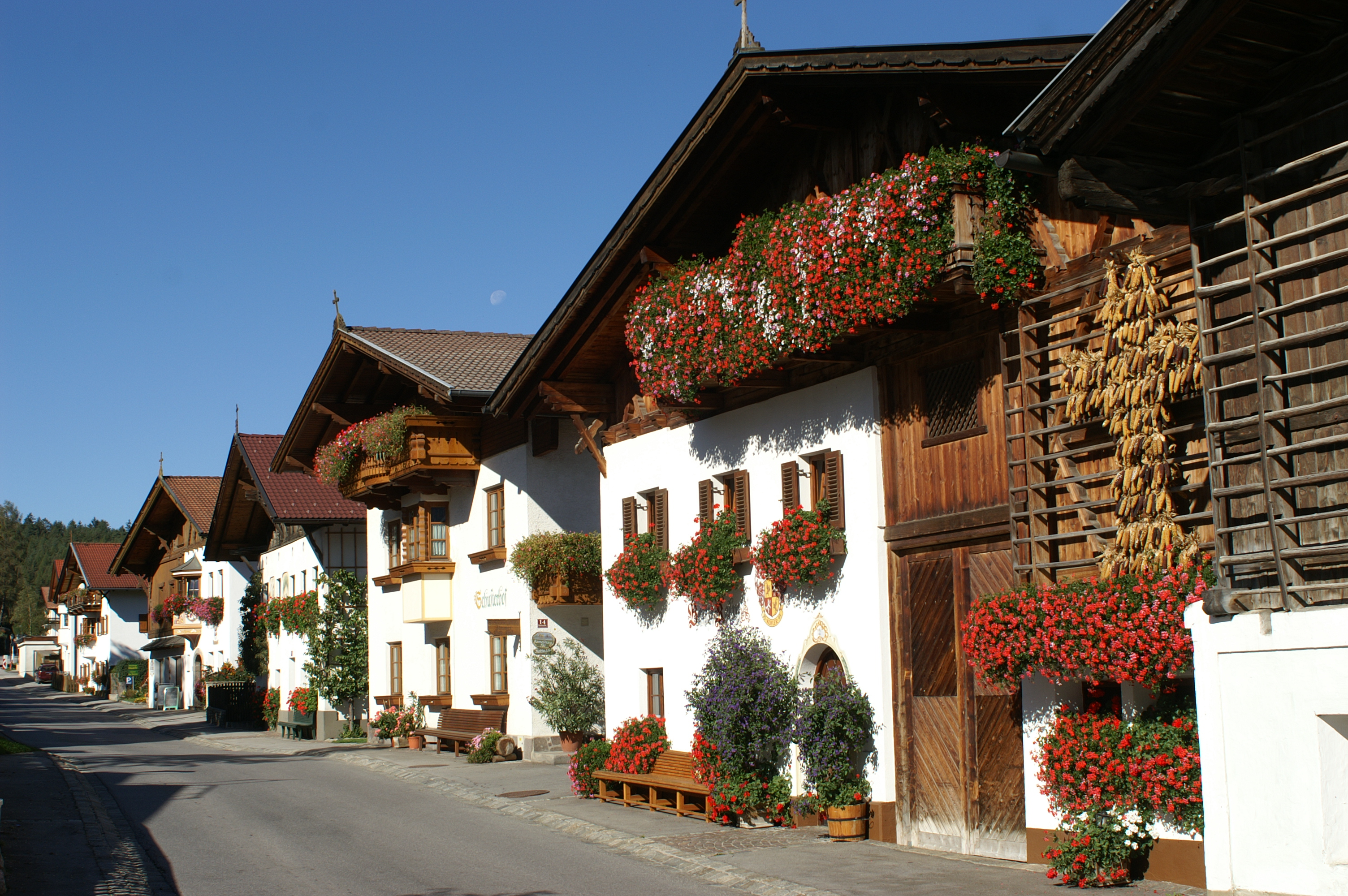 Ortsteil von Mutters This media shows the remarkable cultural object in the Austrian state of Tyrol listed by the Tyrolean Art Cadastre with the ID 35735. (on tirisMaps, pdf, more images on Commons, Wikidata) This media shows the remarkable cultural object in the Austrian state of Tyrol listed by the Tyrolean Art Cadastre with the ID 35736. (on tirisMaps, pdf, more images on Commons, Wikidata)